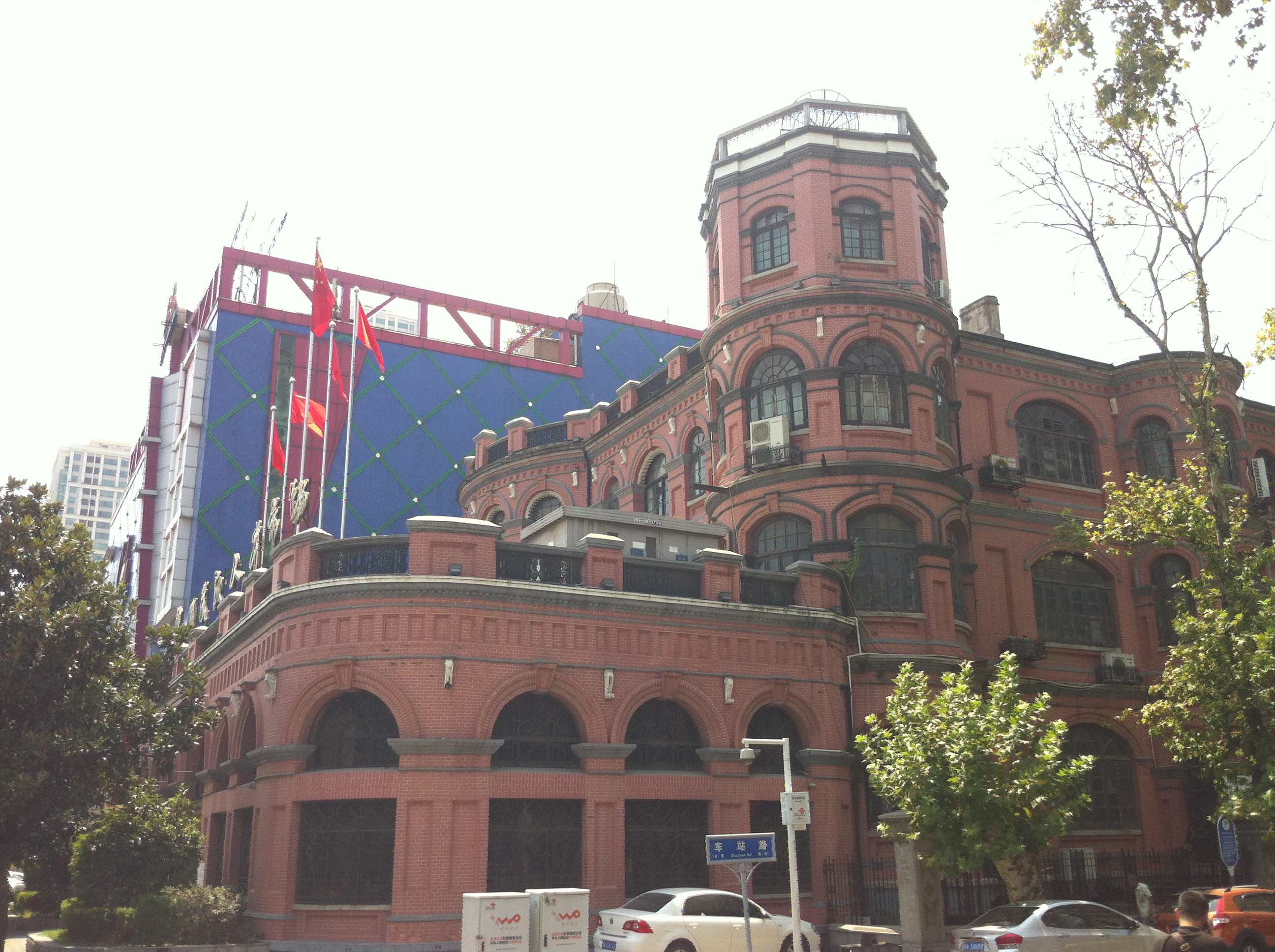 中文（中国大陆）: 原美国领事馆